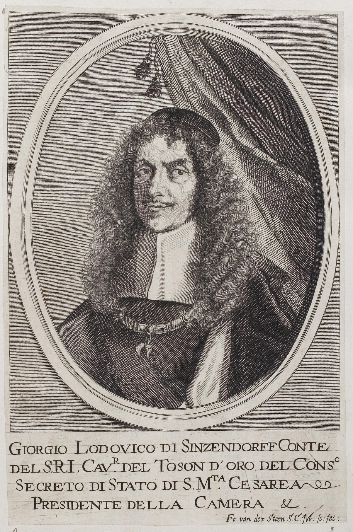 Grafik aus dem Klebeband Nr. 2 der Fürstlich Waldeckschen Hofbibliothek Arolsen Motiv: Georg Ludwig von Sinzendorf